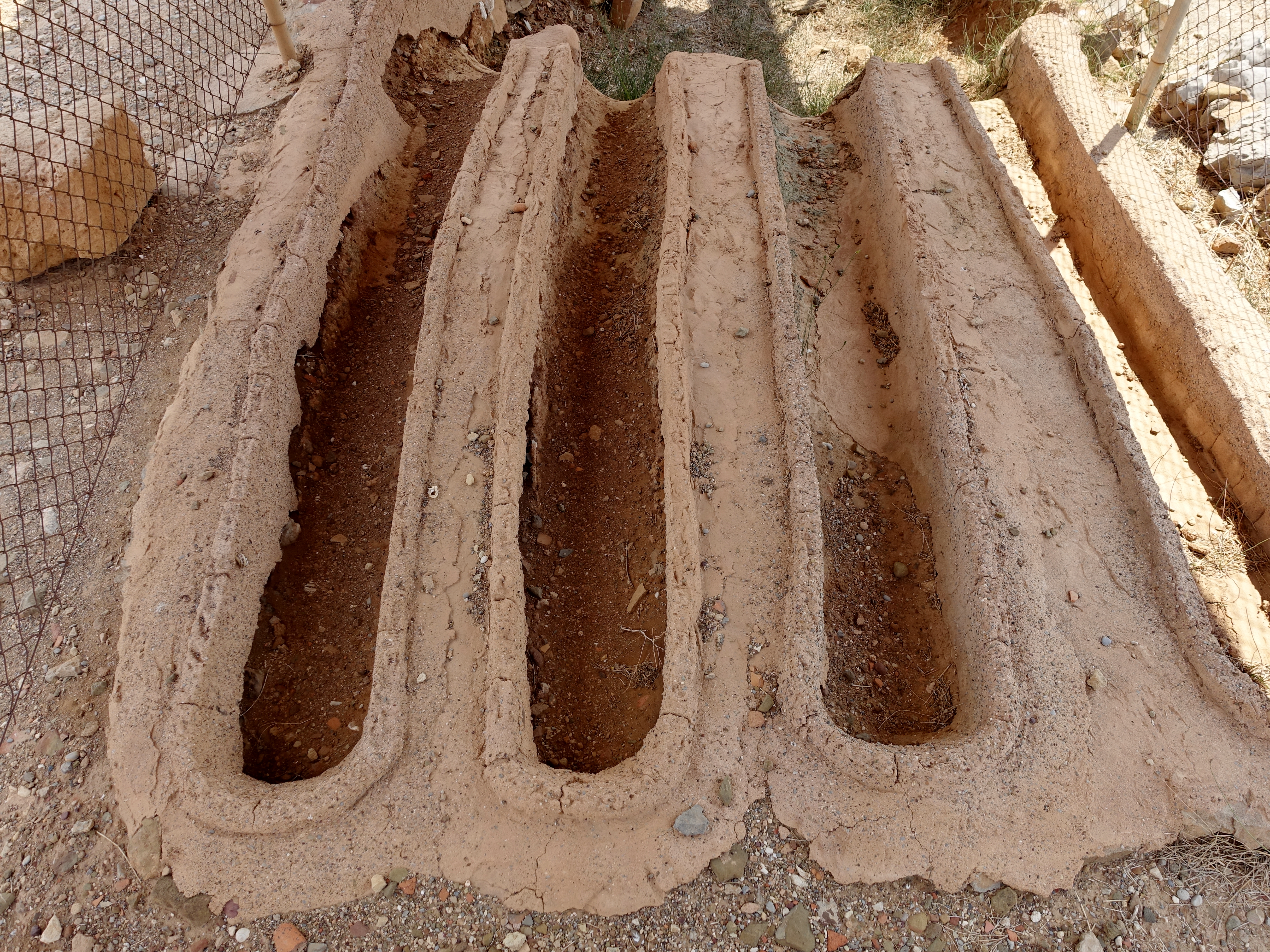 Palast von Zakros (Ανάκτορο της Ζάκρου) bei Kato Zakros (Κάτω Ζάκρος), Gemeinde Sitia, Kreta, Griechenland